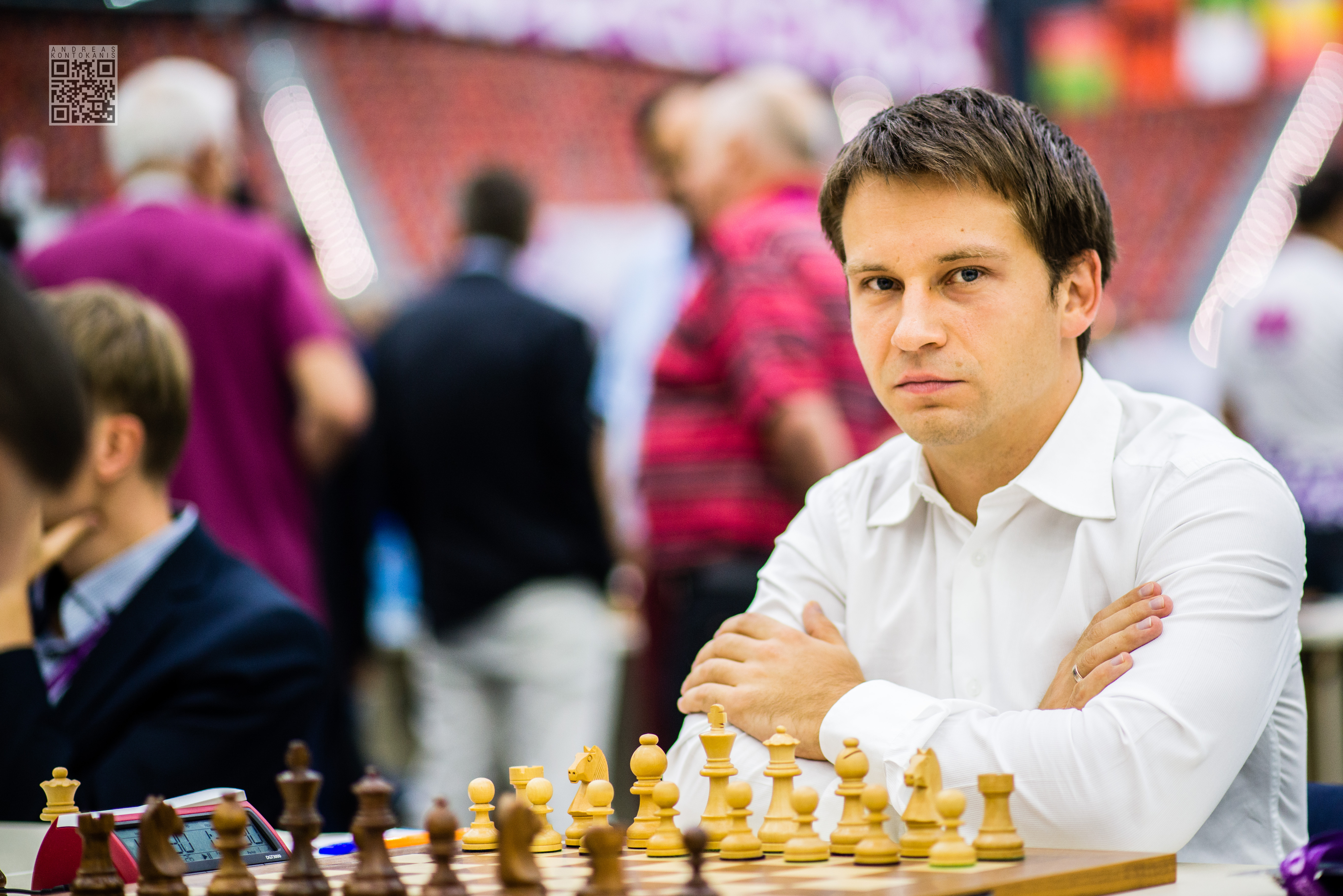 Volokitin Andrei